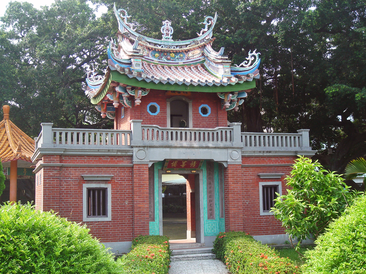 積善樓。